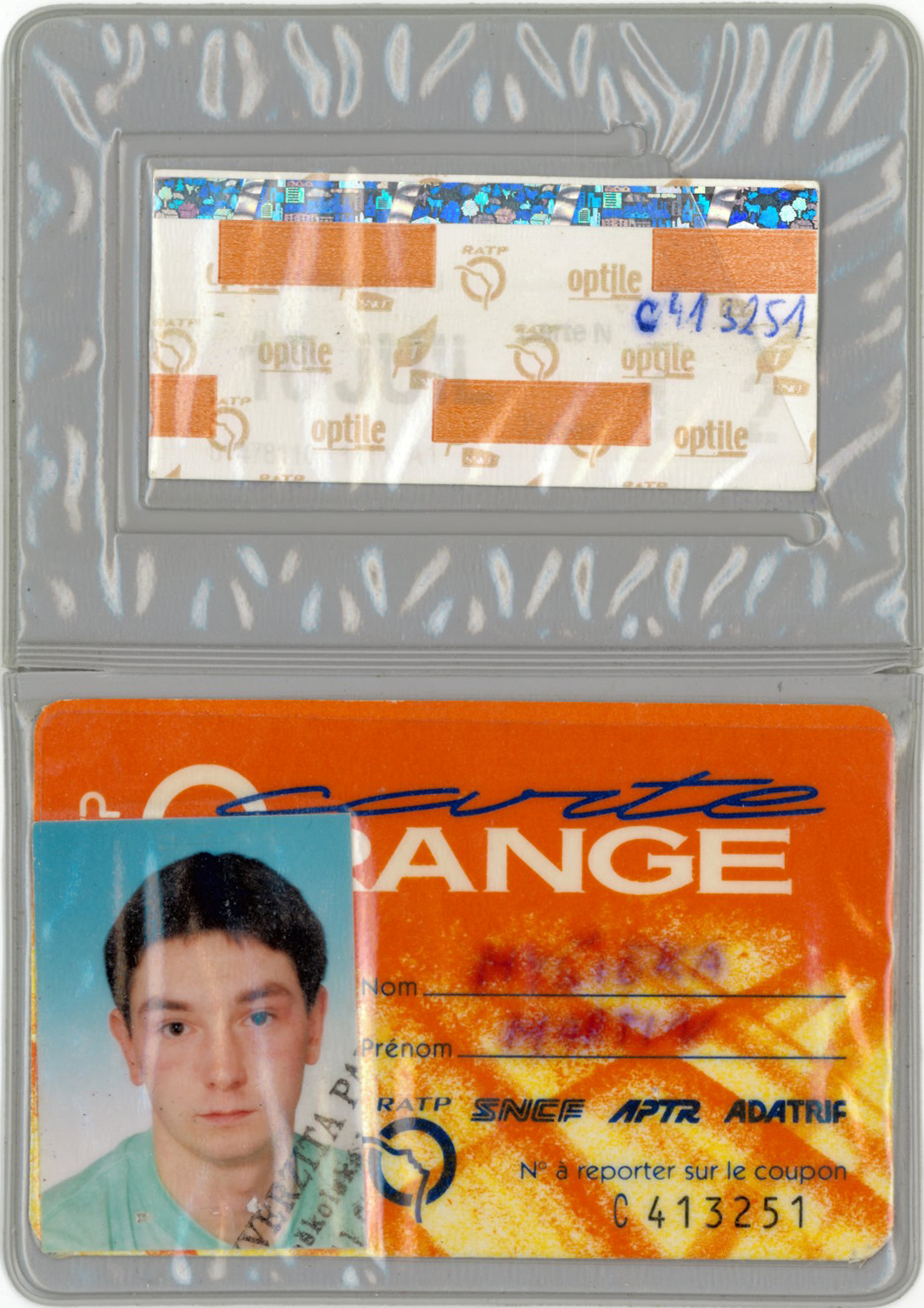 Carte Orange (1994) avec coupon hebdomadaire (2006); proprietaire Hadonos